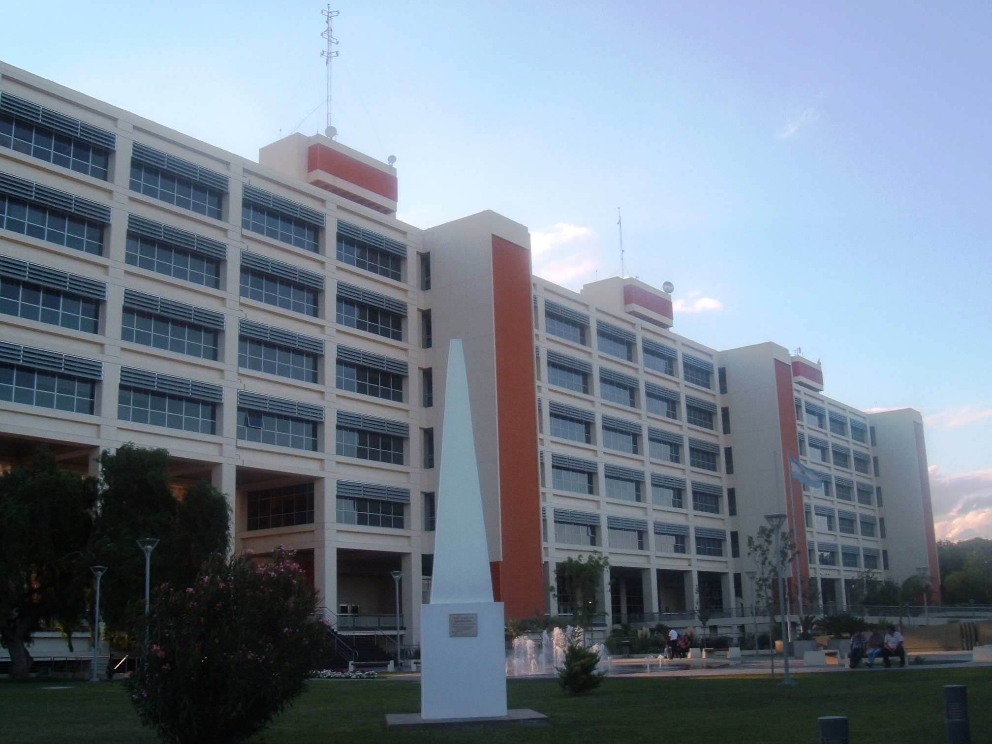 Vista del edificio del edifio del Centro Cívico de la provincia de San Juan